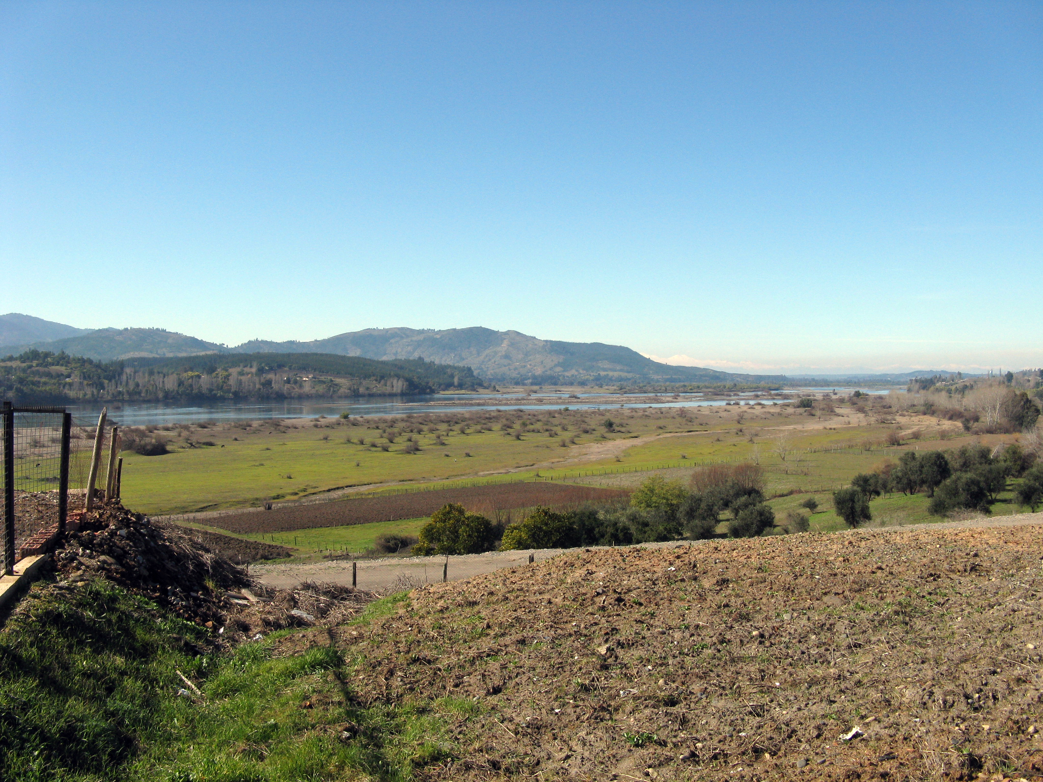 Pueblo de Ñipas, comuna de Ránquil, provincia de Itata, XVI Región de Ñuble, Chile. Al fondo se aprecia el Río Itata. Tomada en agosto de 2010.